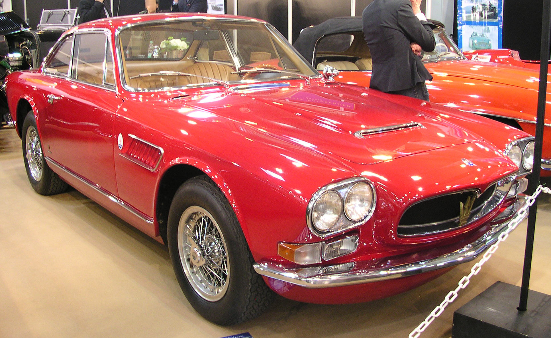 Maserati Sebring Series II, Baujahr 1965, 3700 cm³ Hubraum